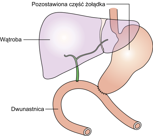 Pankreatektomia